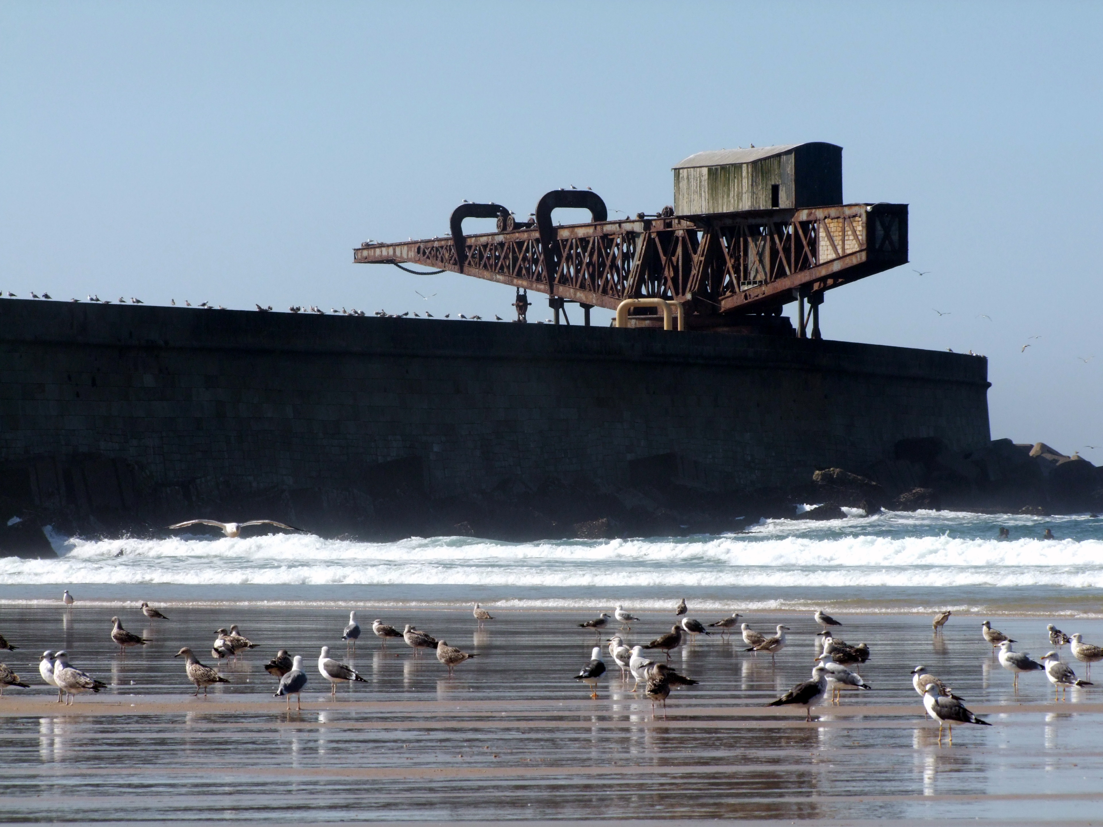 Porto de Leixões, antigo guindaste do molhe norte (Titã). Em Matosinhos, Porto, Portugal. Guindaste movido a vapor, deslocando-se sobre carris, utilizado essencialmente para a construção e reparação dos molhes (c.1884), embora também tenha sido utilizado para operações de carga e descarga de navios. Empresa construtora "Fives-Lille". This monument is classified as Em estudo.